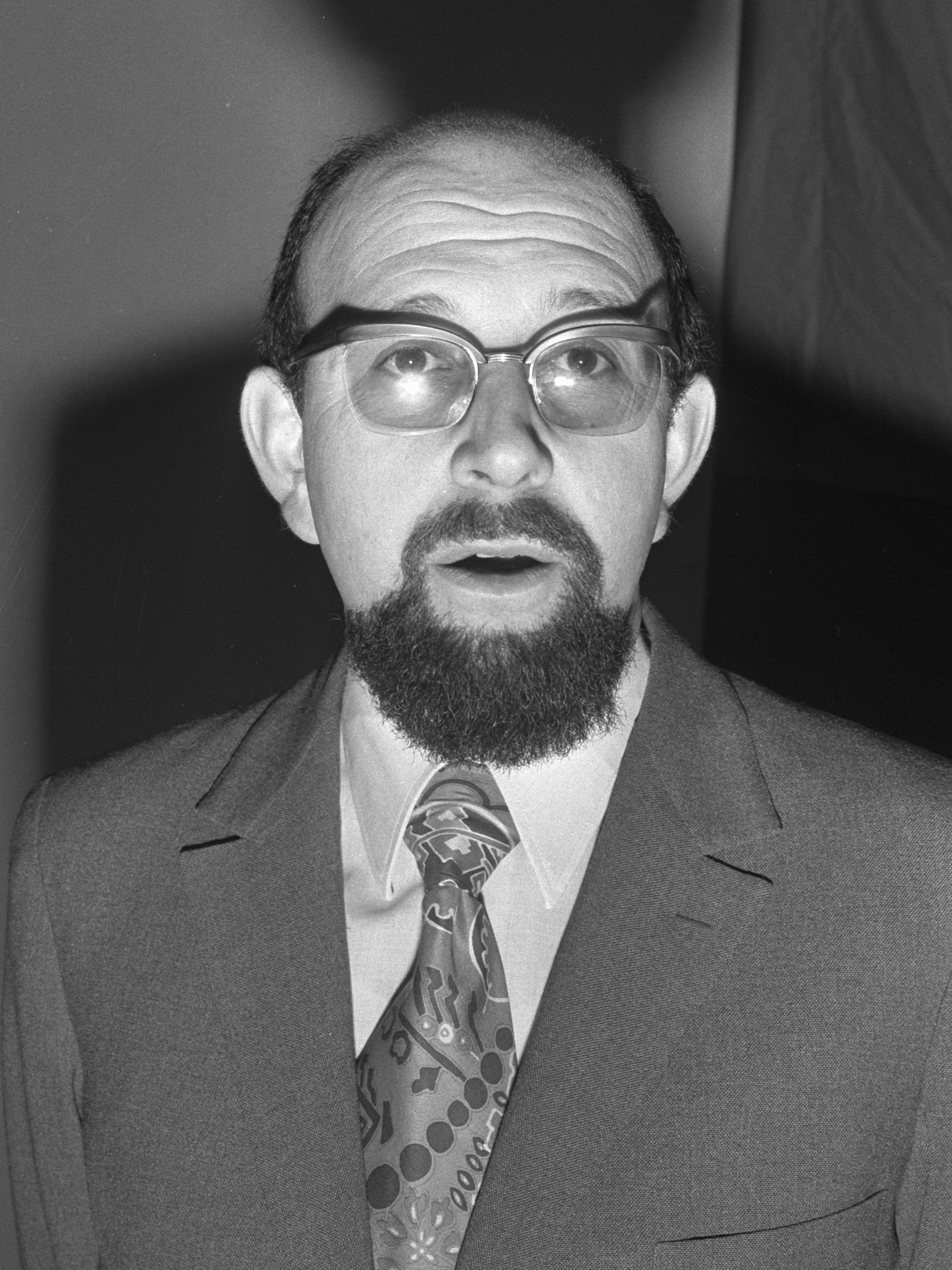 Congres over milieumoord in Vietnam in Nijmegen, Sociaal geograaf prof. dr. Yves Lacoste